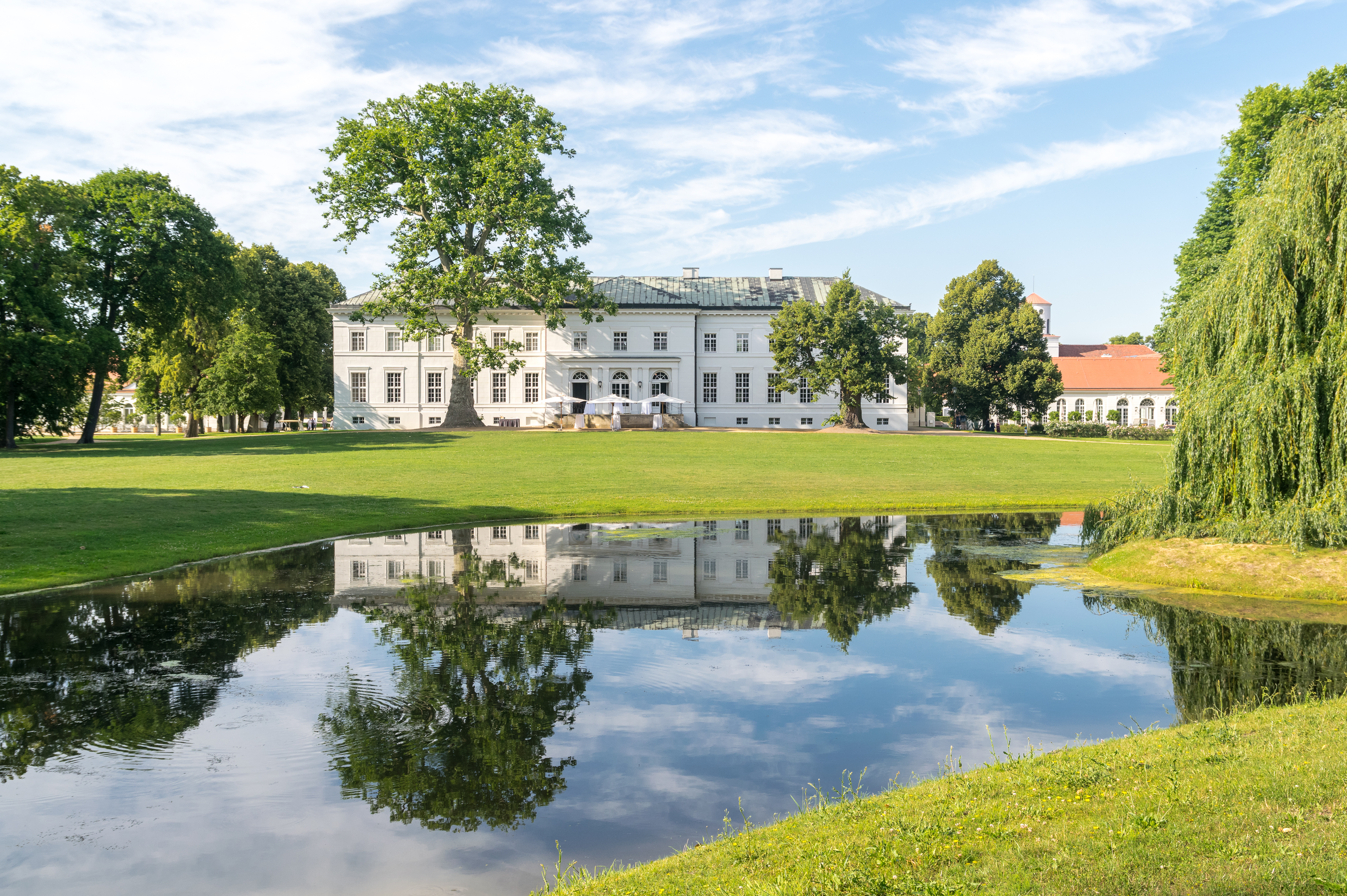 Schloss Neuhardenberg, Parkseite